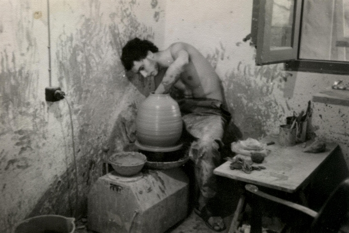 Alfarero torneando un jarro en un torno de alfarero electrico.